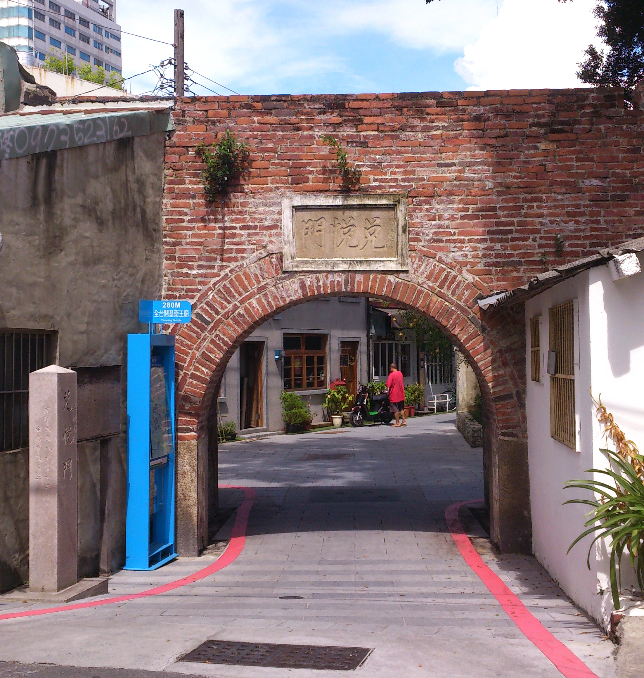 台南兌悅門2014.06